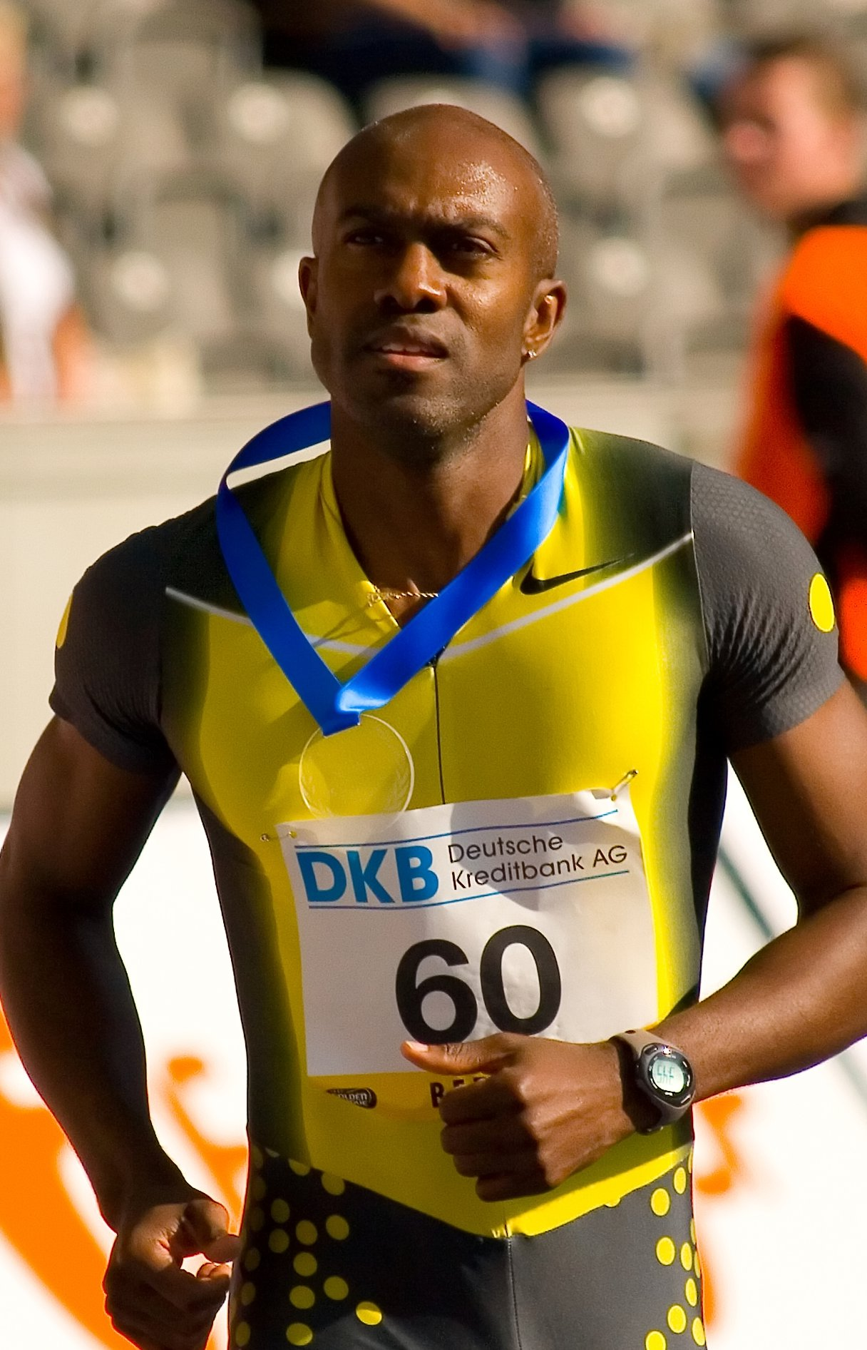 Allen Johnson Istaf Berlin